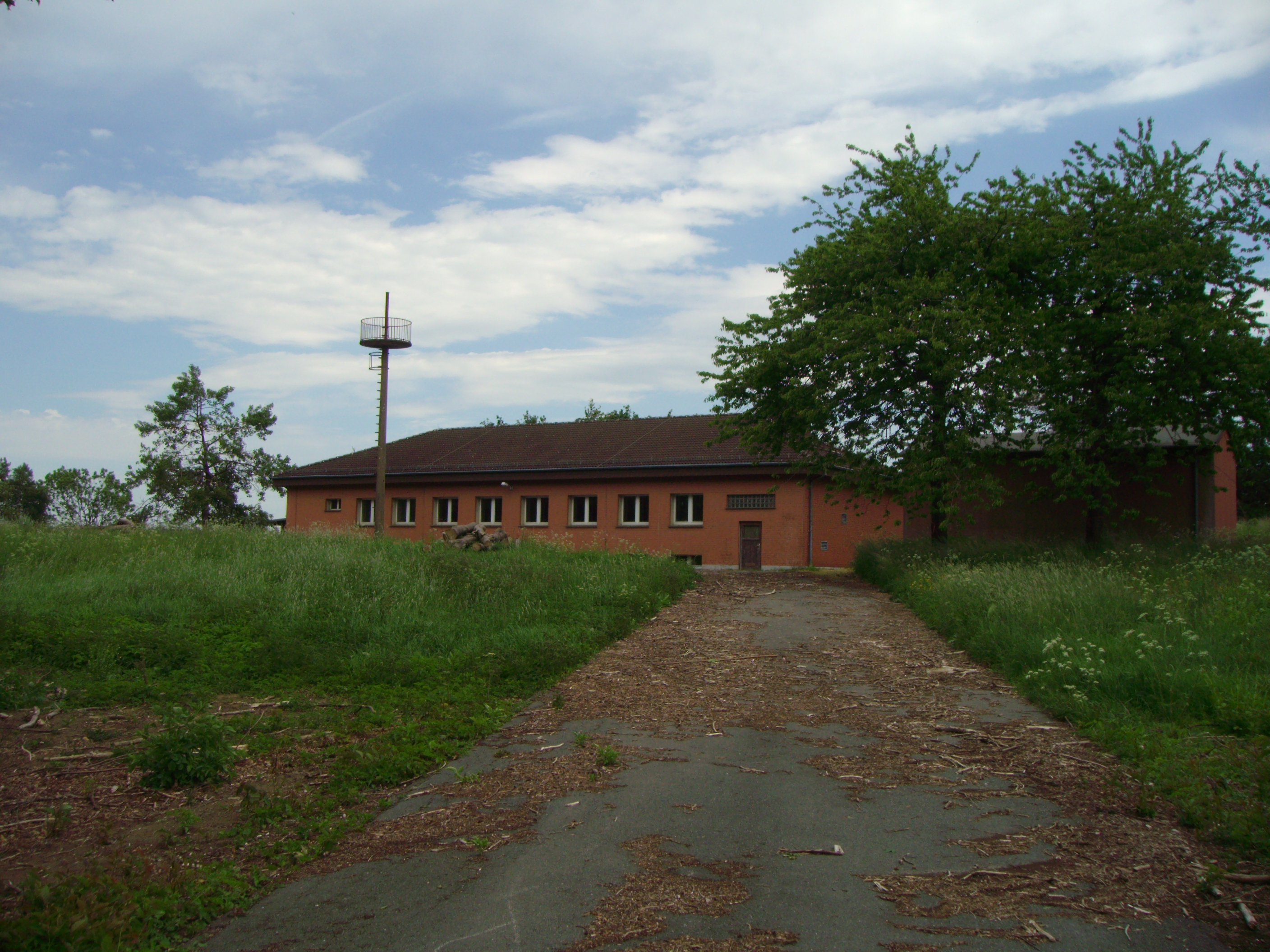 Die alte Funkstation in Moenkeberg Feldrom